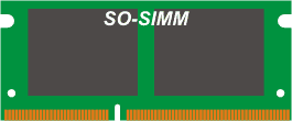 S0-Simm-Ram Modul M1:1